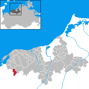 Kirch Mulsow in Mecklenburg-Western Pomerania - District Bad Doberan